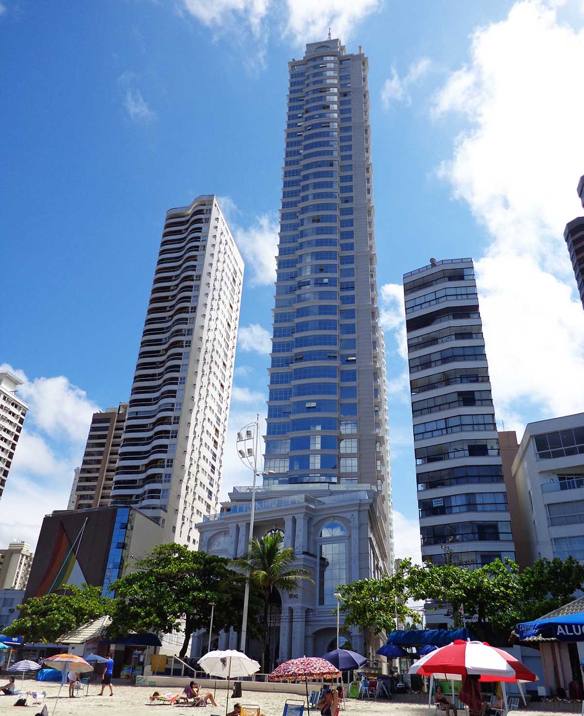 vista frontal do Millennium palace